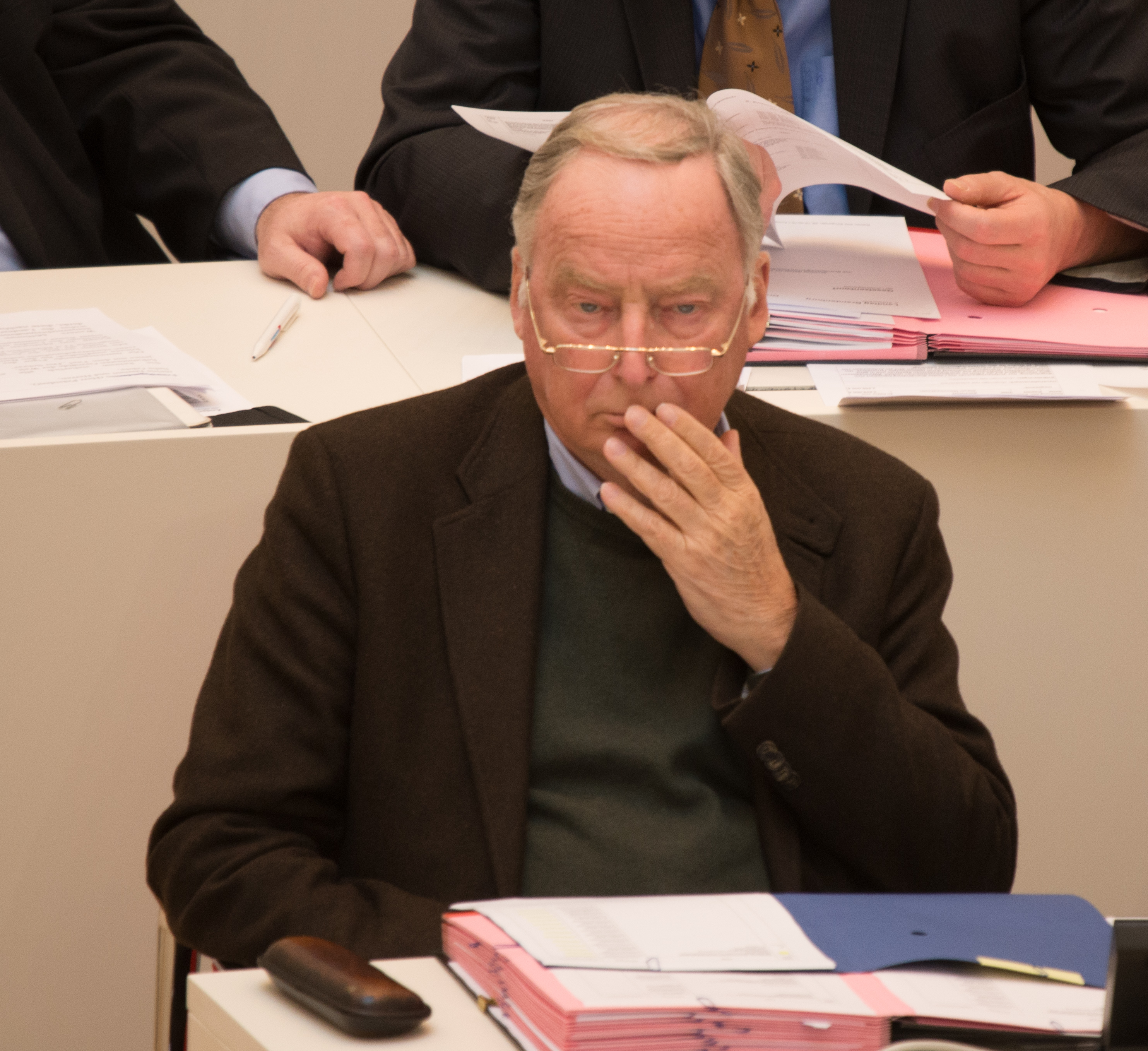 Impressionen aus der Plenarsitzung vom 9. März 2016 des Landtages Brandenburg